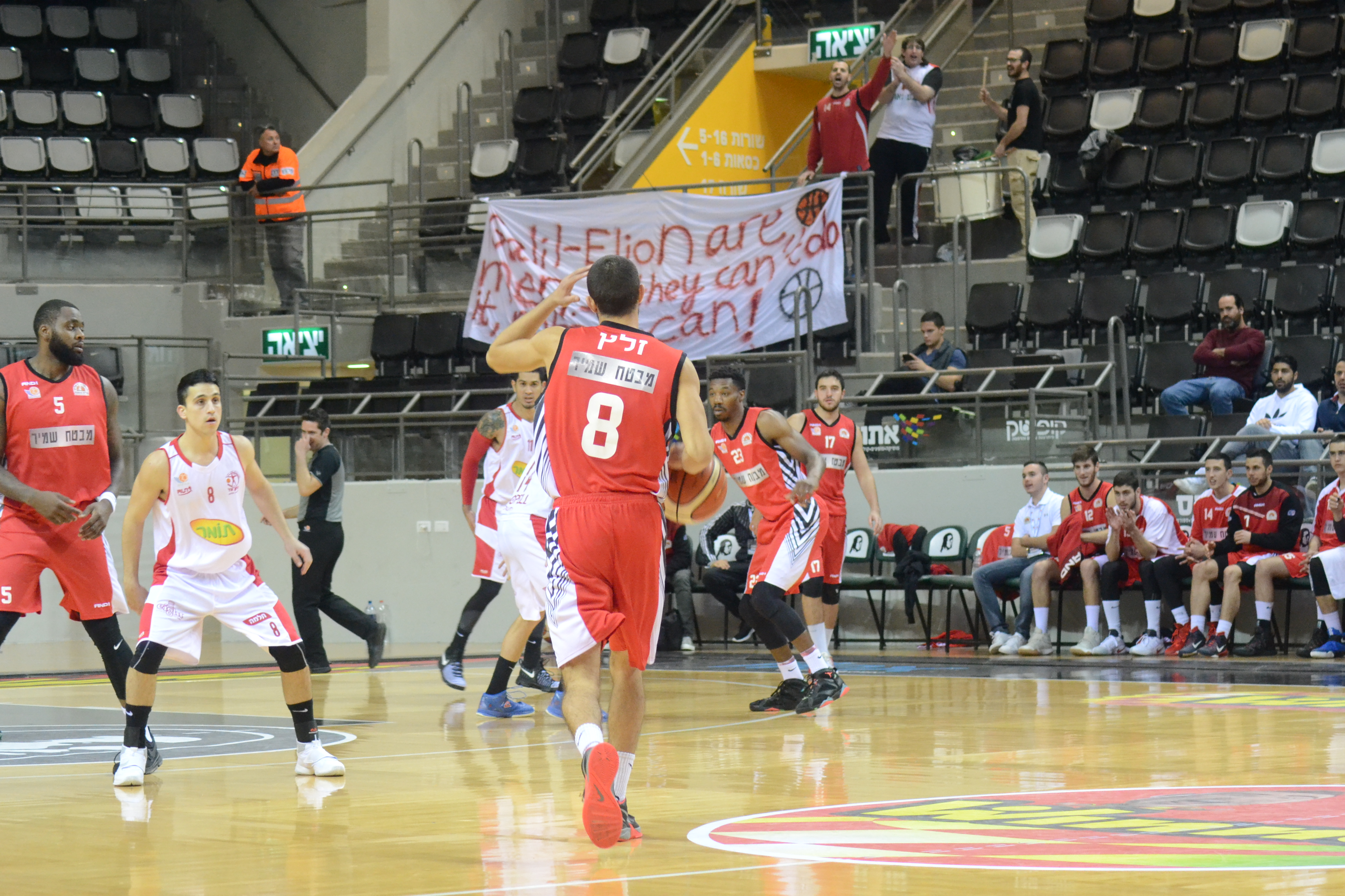 שחקני גליל עליון/קש במשחק נגד הפועל חיפה 2016